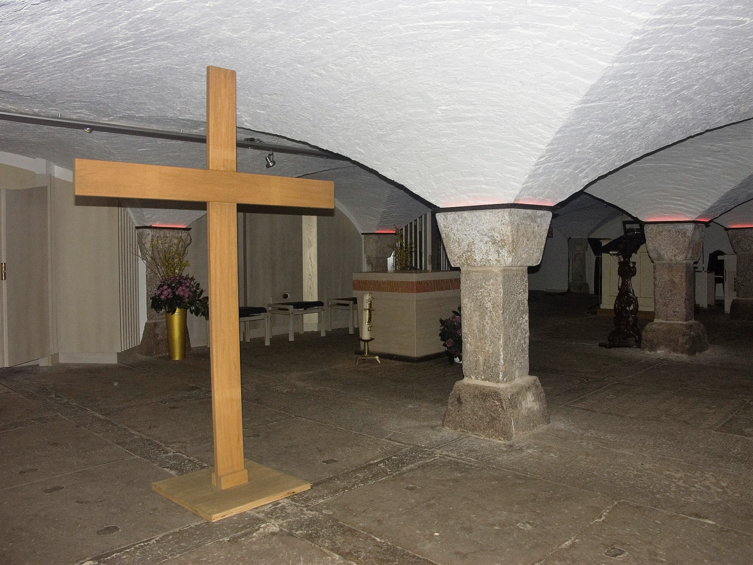 Gewölbe der St.-Michaelis-Kirche (Hamburg) This is a photograph of an architectural monument.